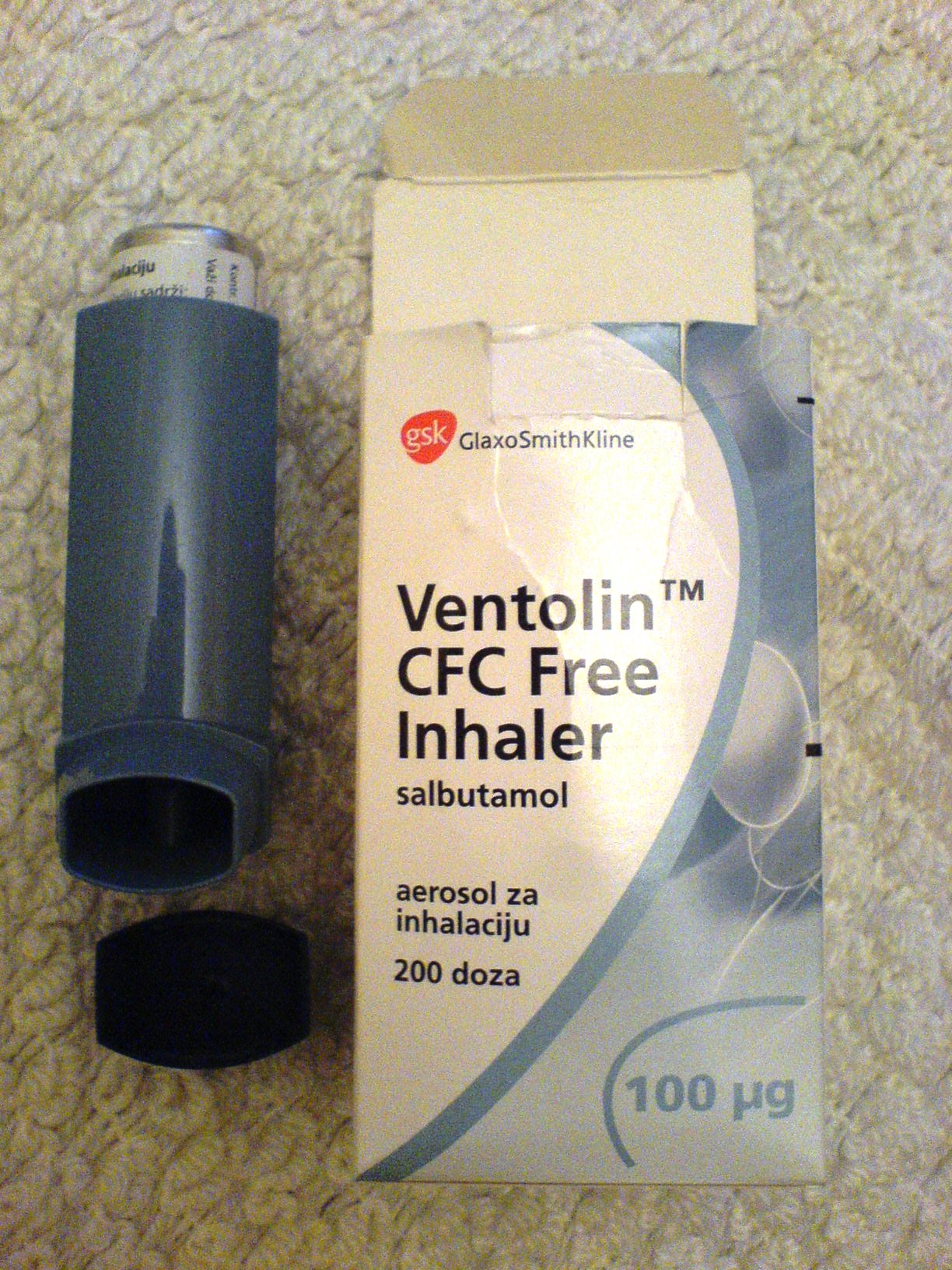 Инхалатор за спречавање асматичног напада.